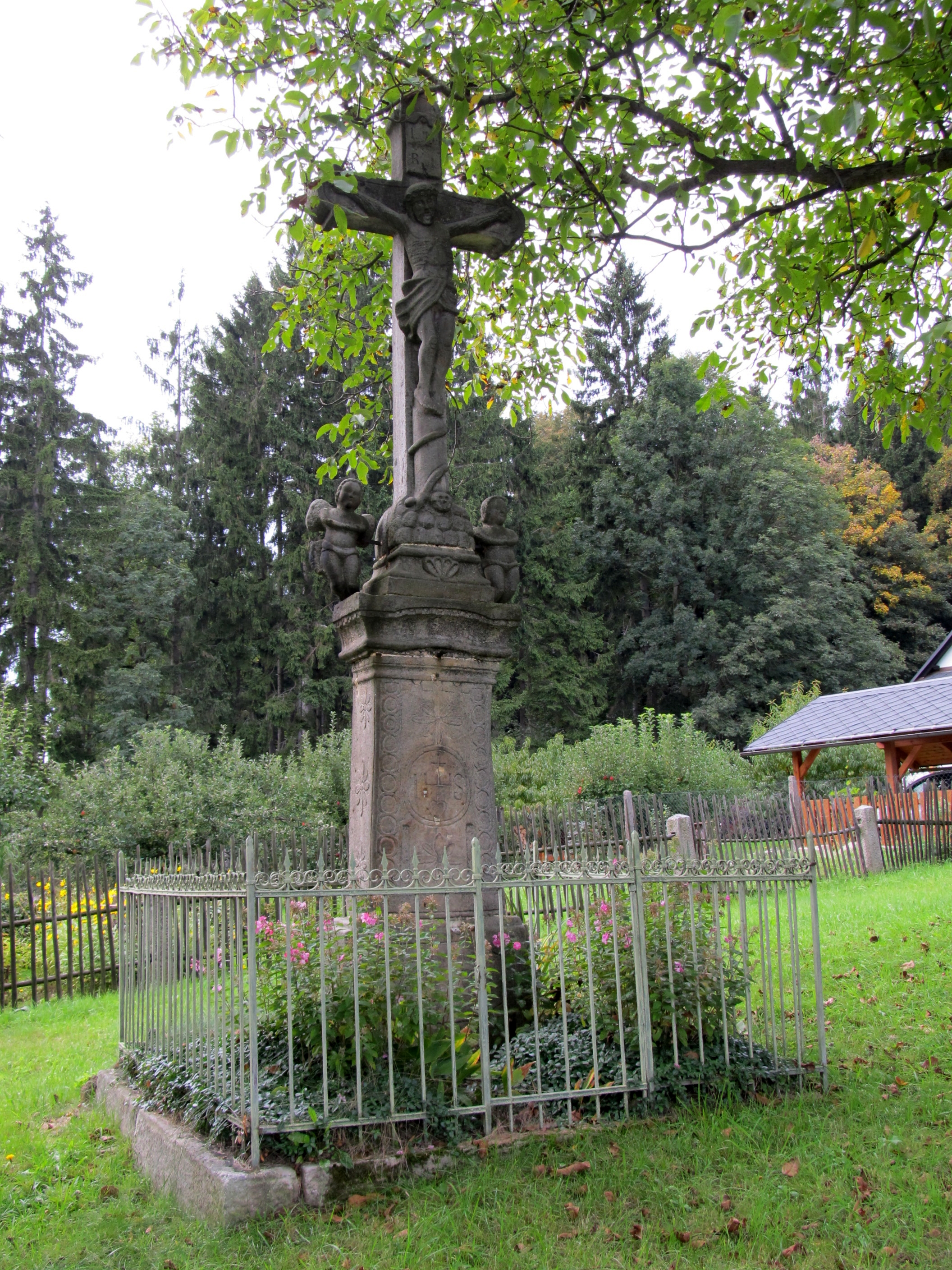 Krucifix (Bakov), Bakov, naproti čp. 8, Bakov